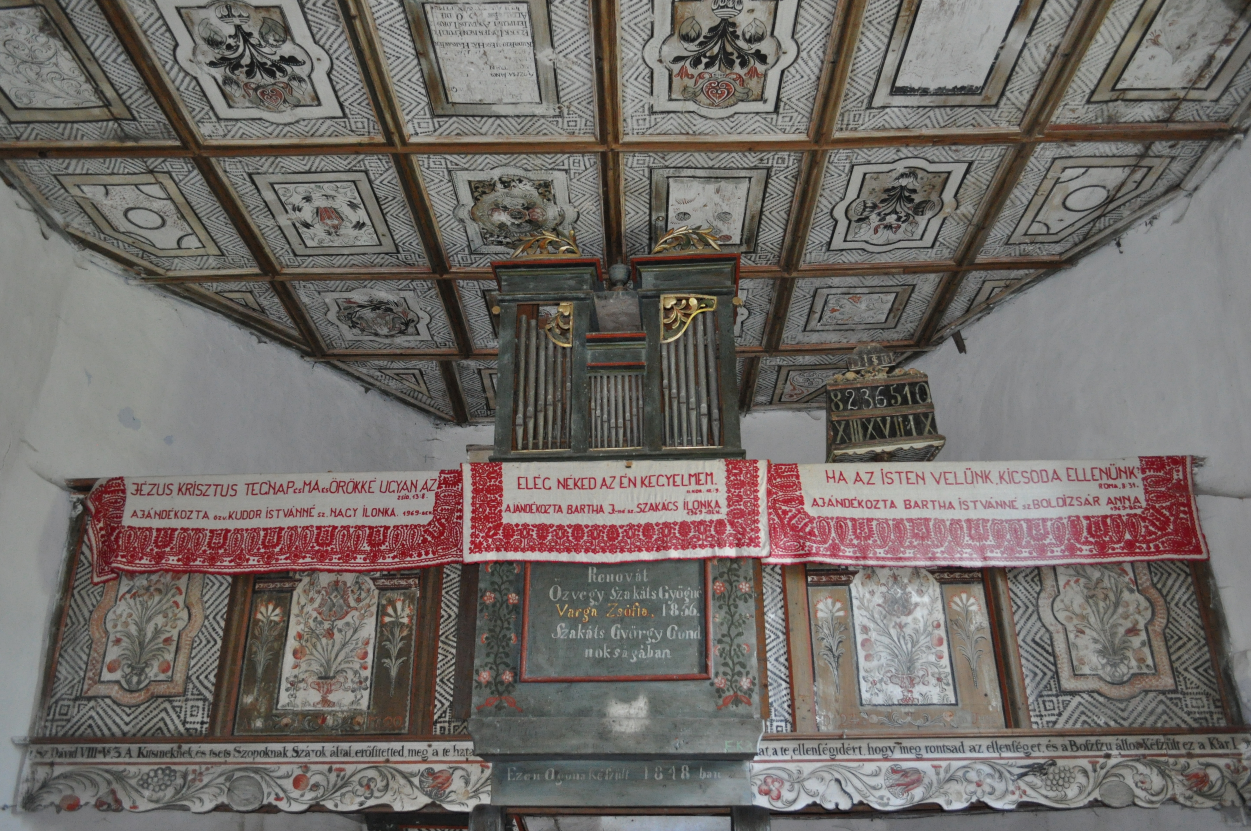 Biserica reformată, sat SFĂRAŞ; comuna ALMAŞU 01